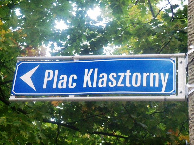 Katowice: plac Klasztorny w Ligocie przed bazyliką franciszkanów - tabliczka